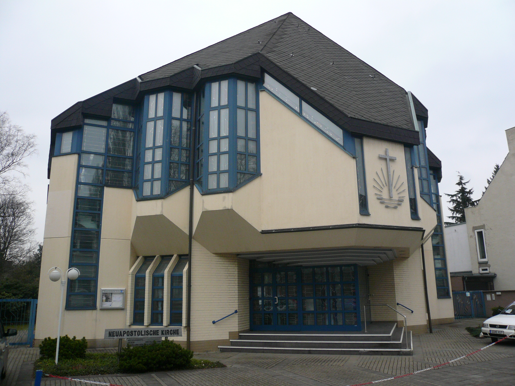 New Apostolic Church Düsseldorf-Derendorf